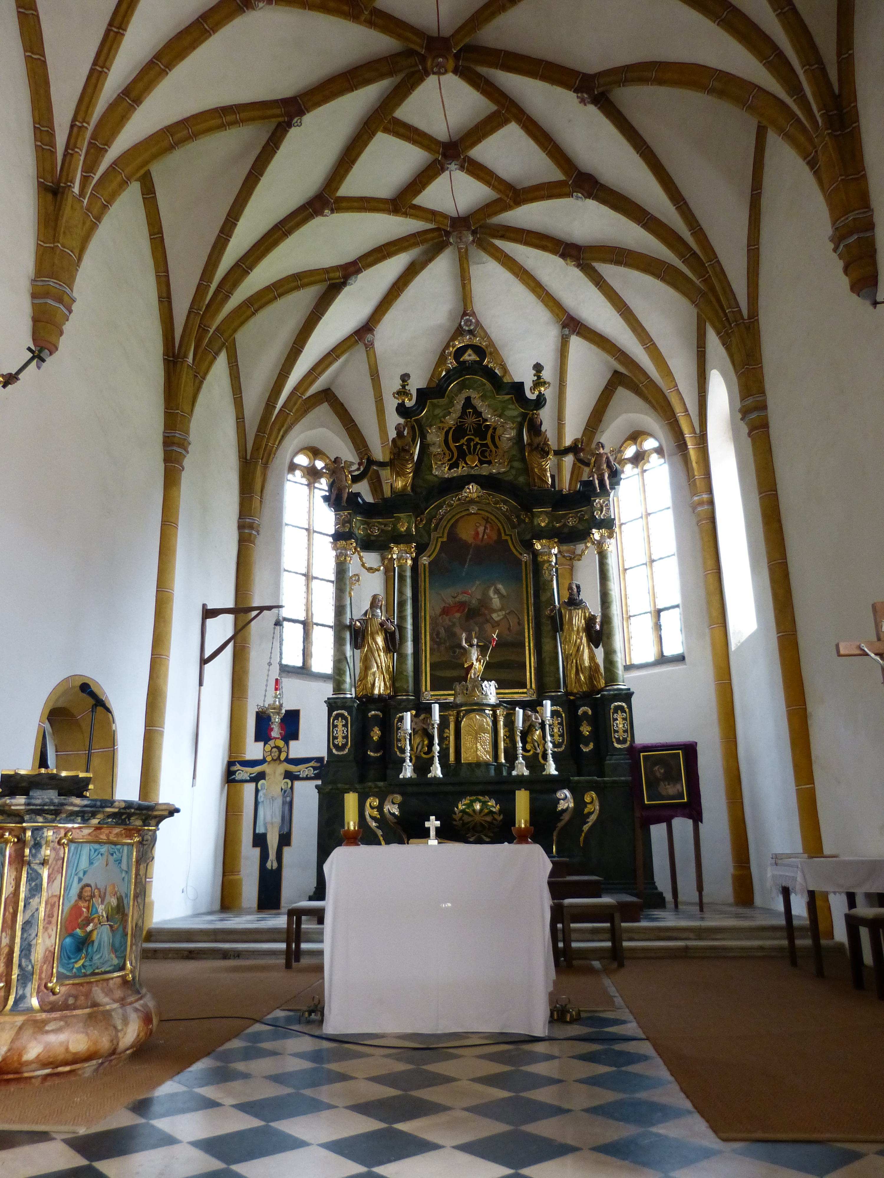 Pfarrkirche Klein Sankt Paul (Kärnten)